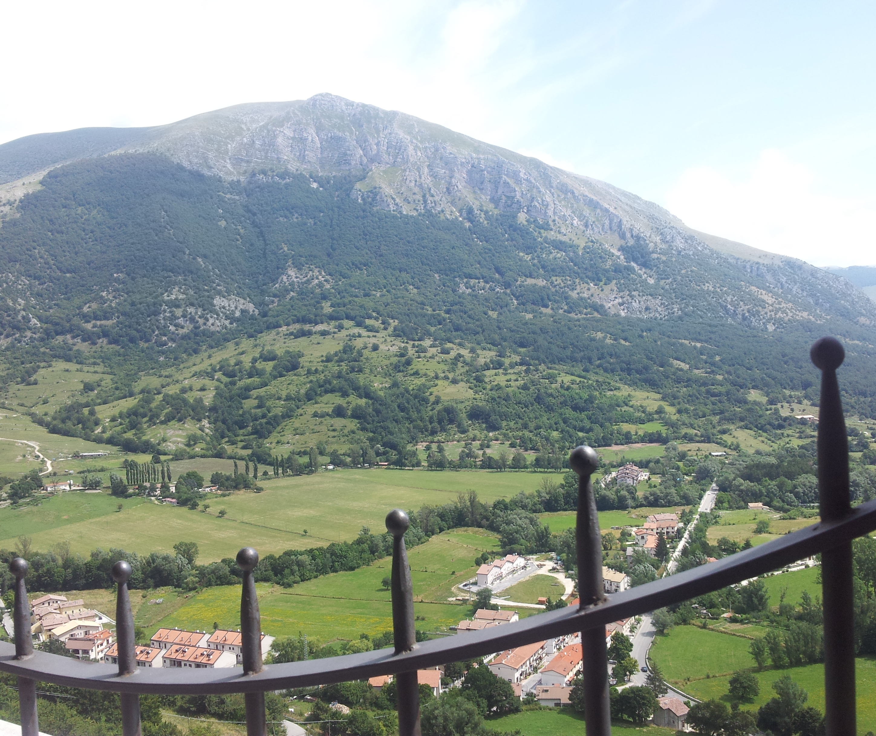 Monte Marsicano This is a photo of a monument which is part of cultural heritage of Italy.